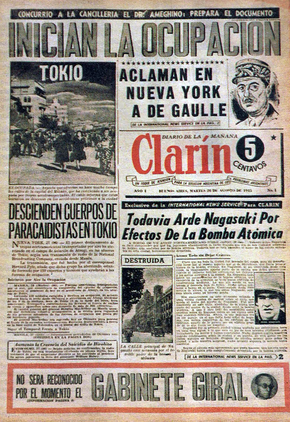 Primera edición del diario argentino Clarín (24 de Agosto de 1945)